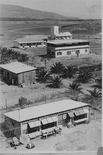 בית זרע - מראה